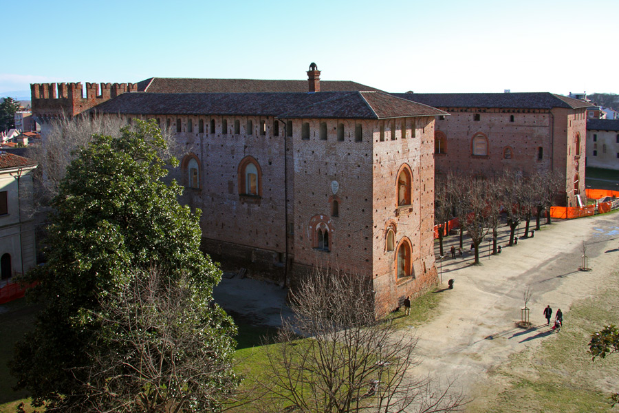 Il maschio del castello Sforzesco di Vigevano (PV) visto dalla torre del Bramante